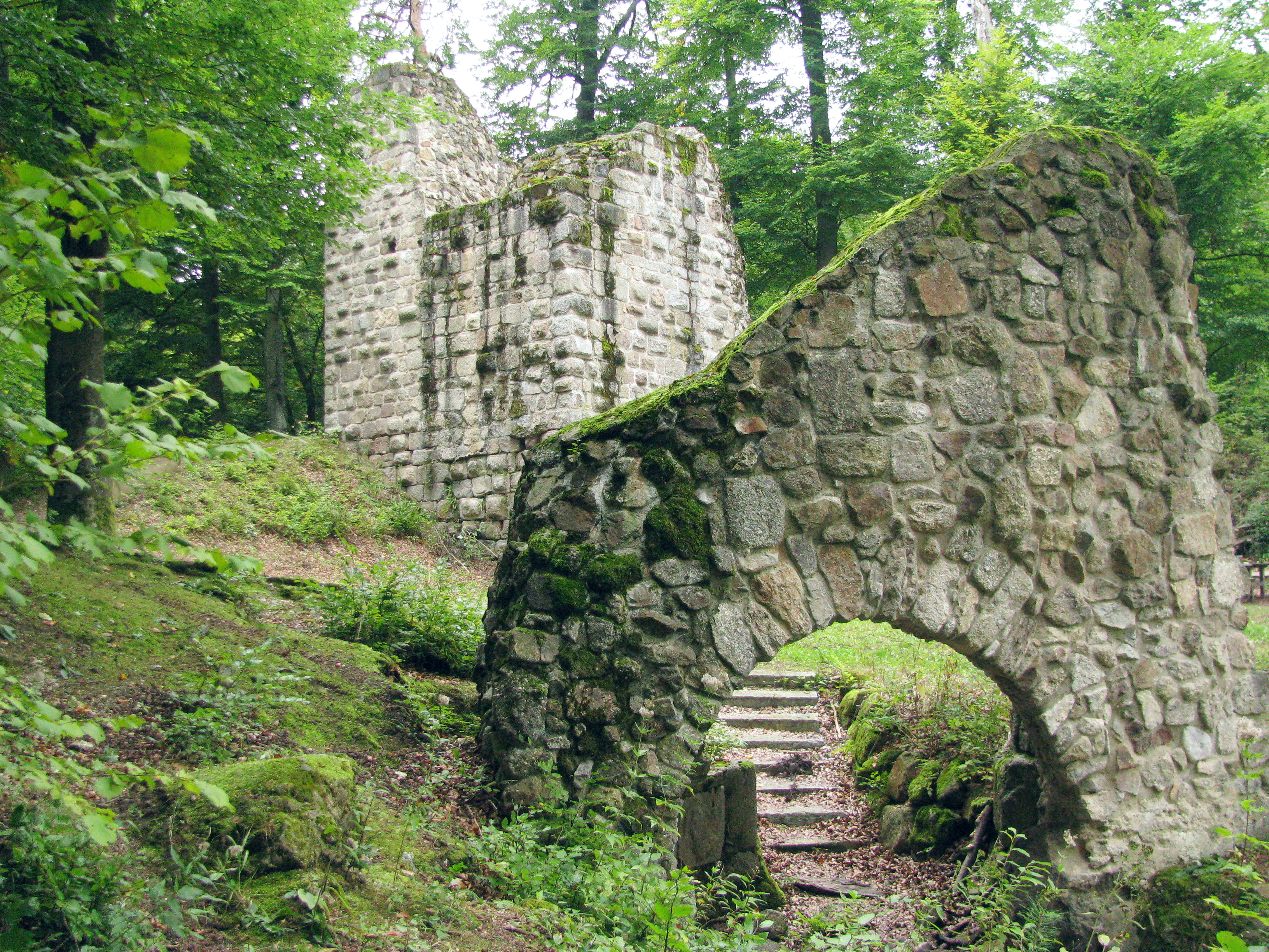 Ruine der Burg Heilsberg